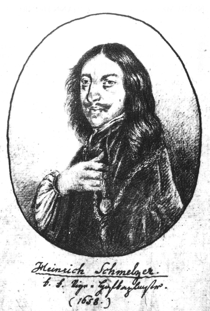 Portrait of Johann Heinrich Schmelzer (c.1620/23–1680)